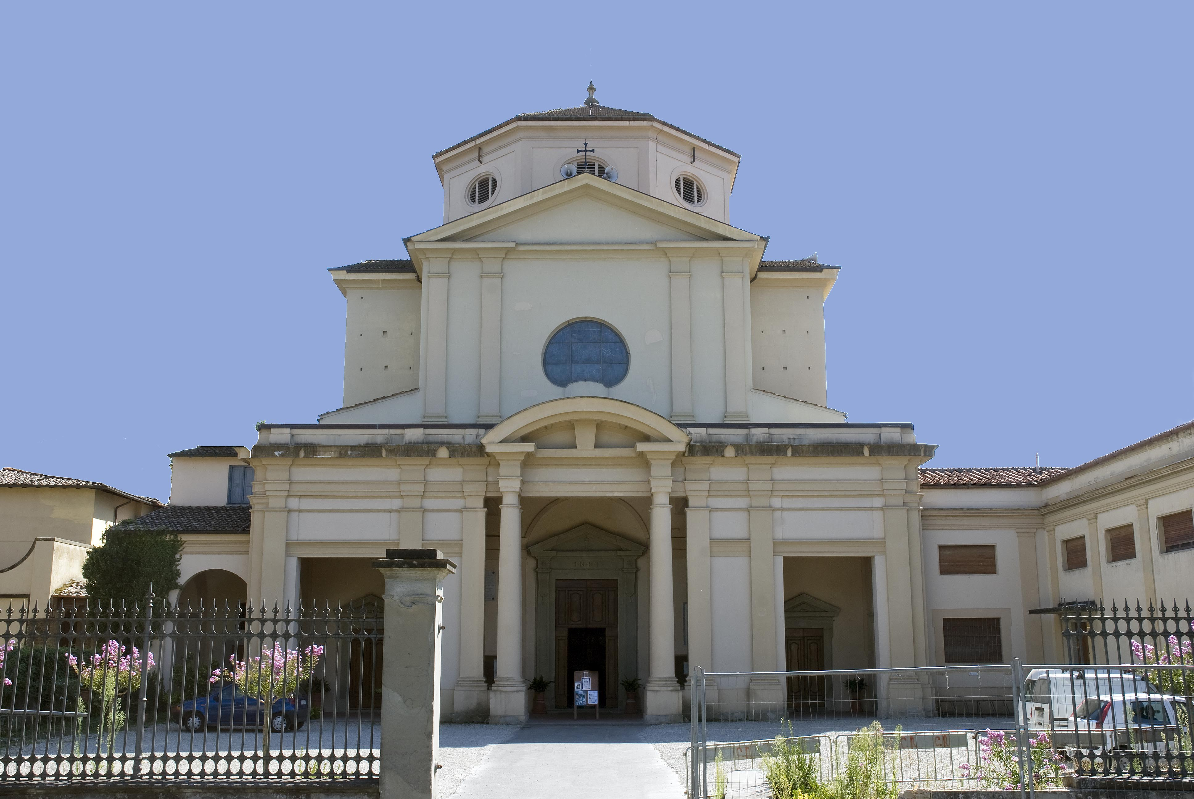 facciata dell'oratorio del santissimo crocifisso - Borgo San Lorenzo